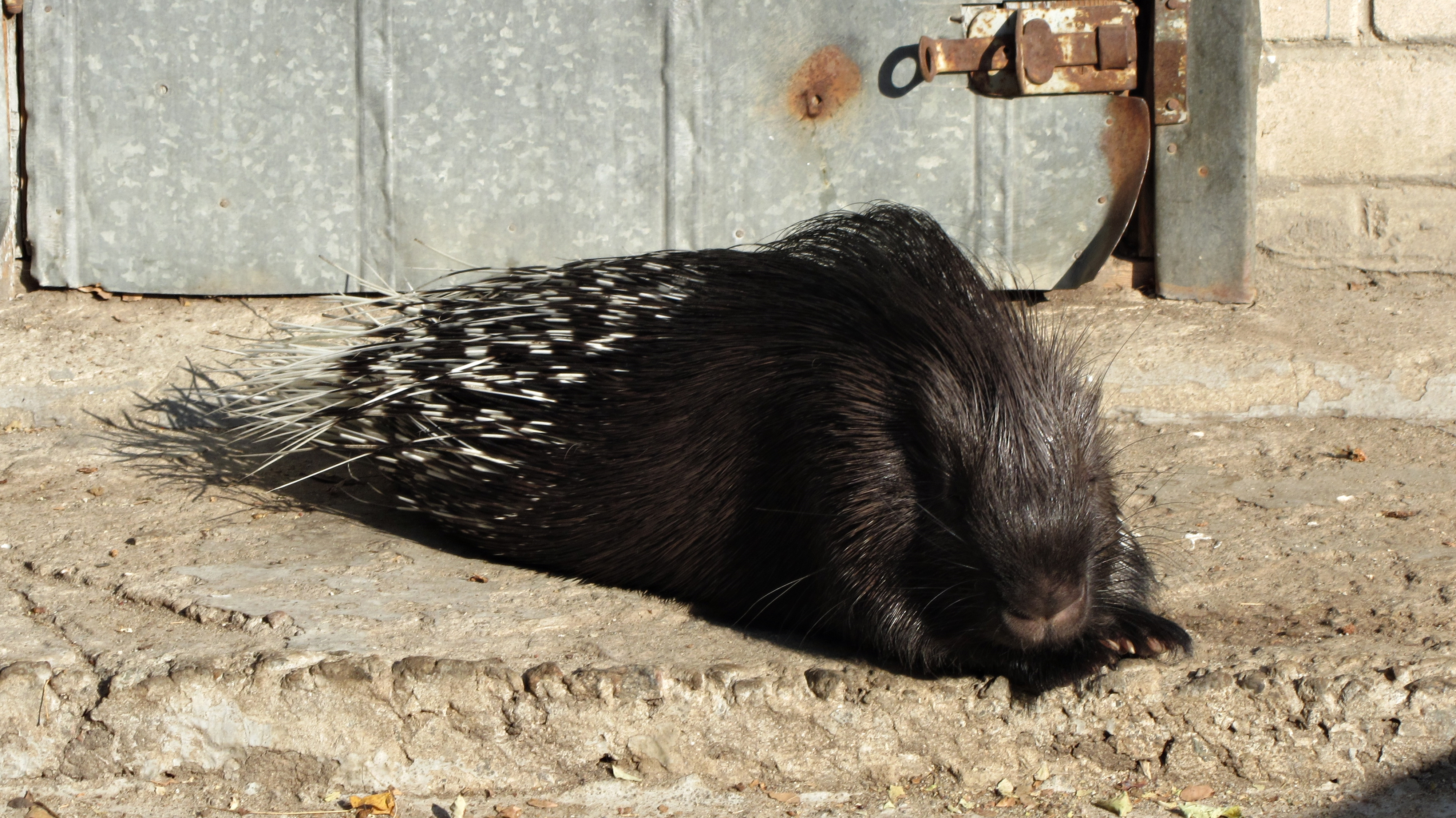 Миколаївський зоопарк, м. Миколаїв